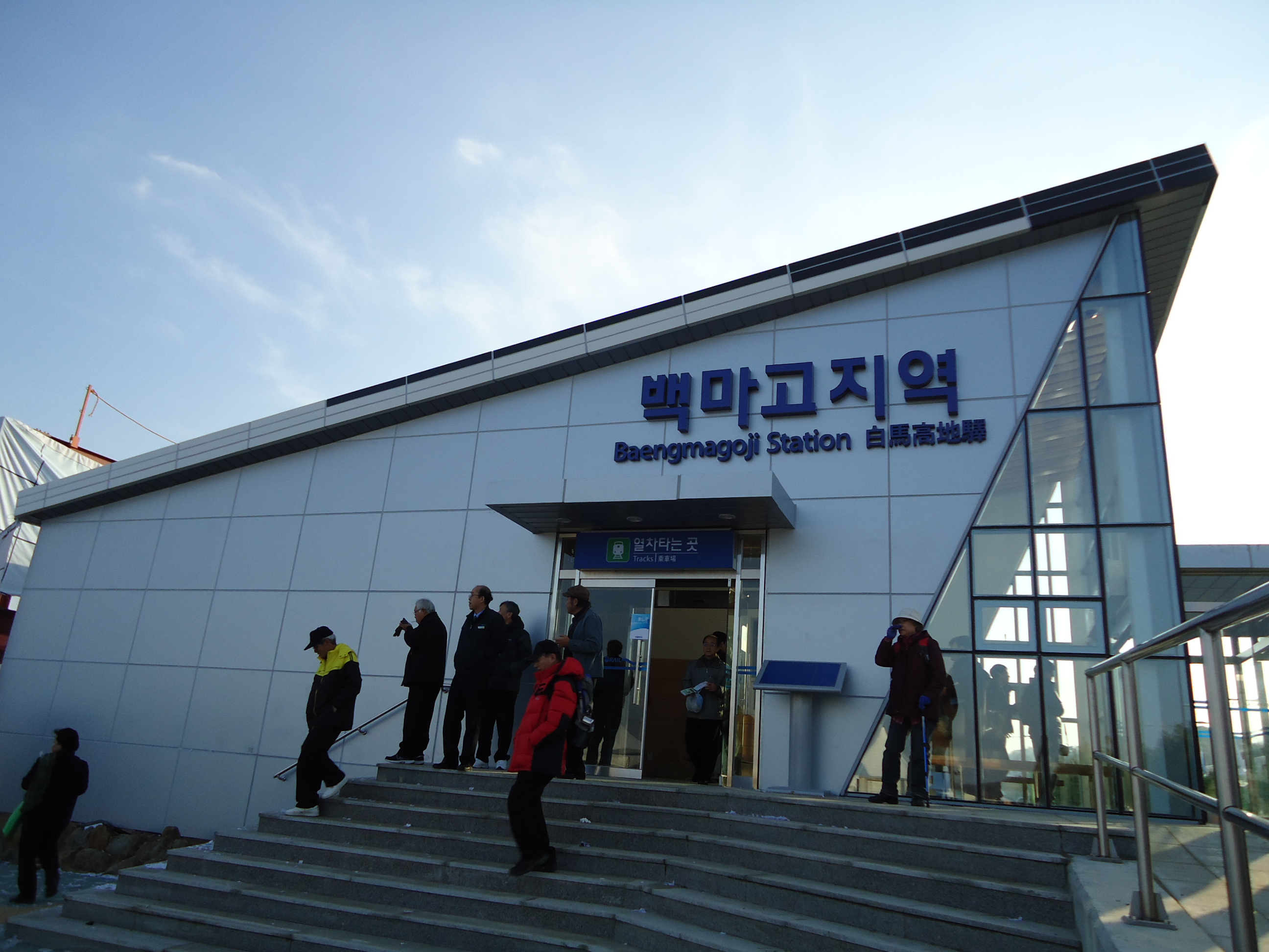 개통일에 찍은 백마고지역